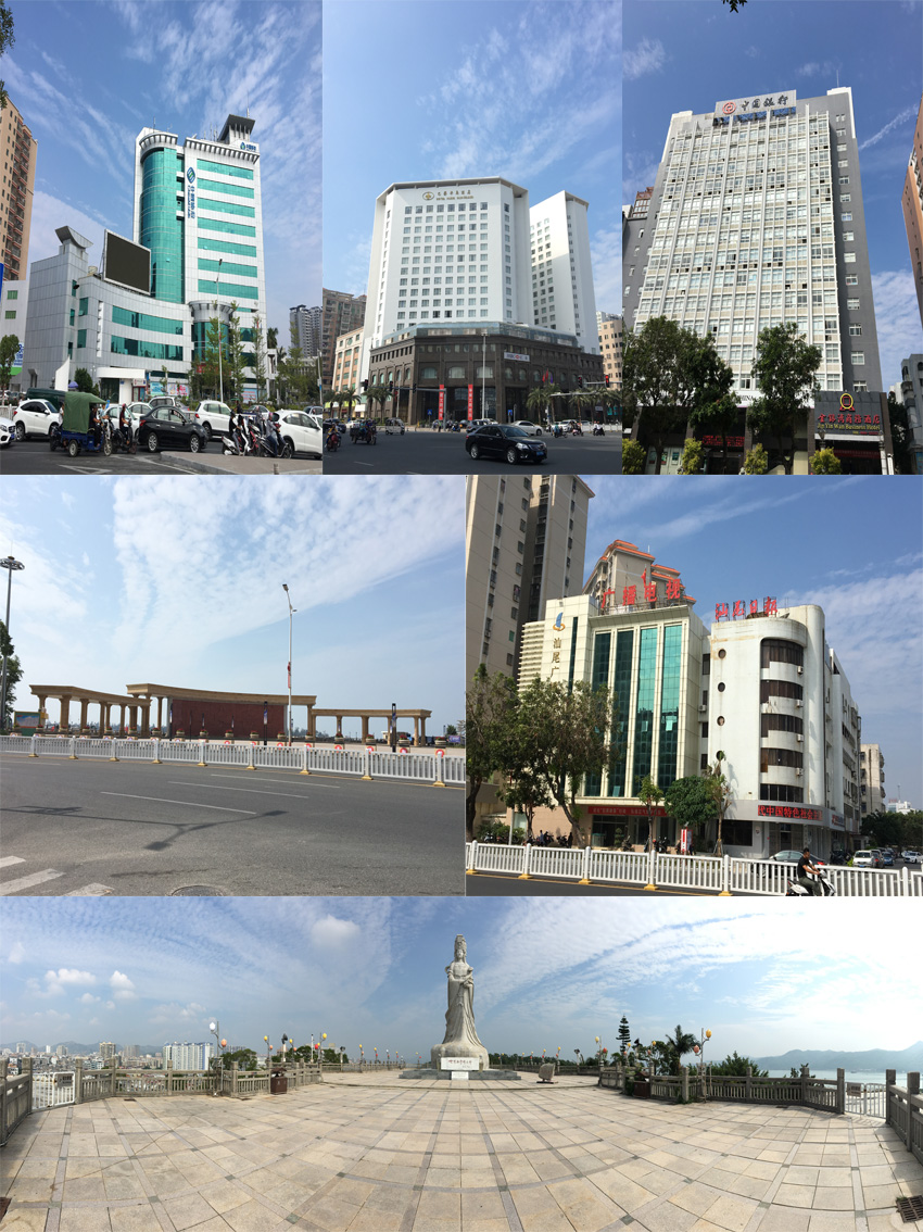 汕尾市著名建築物